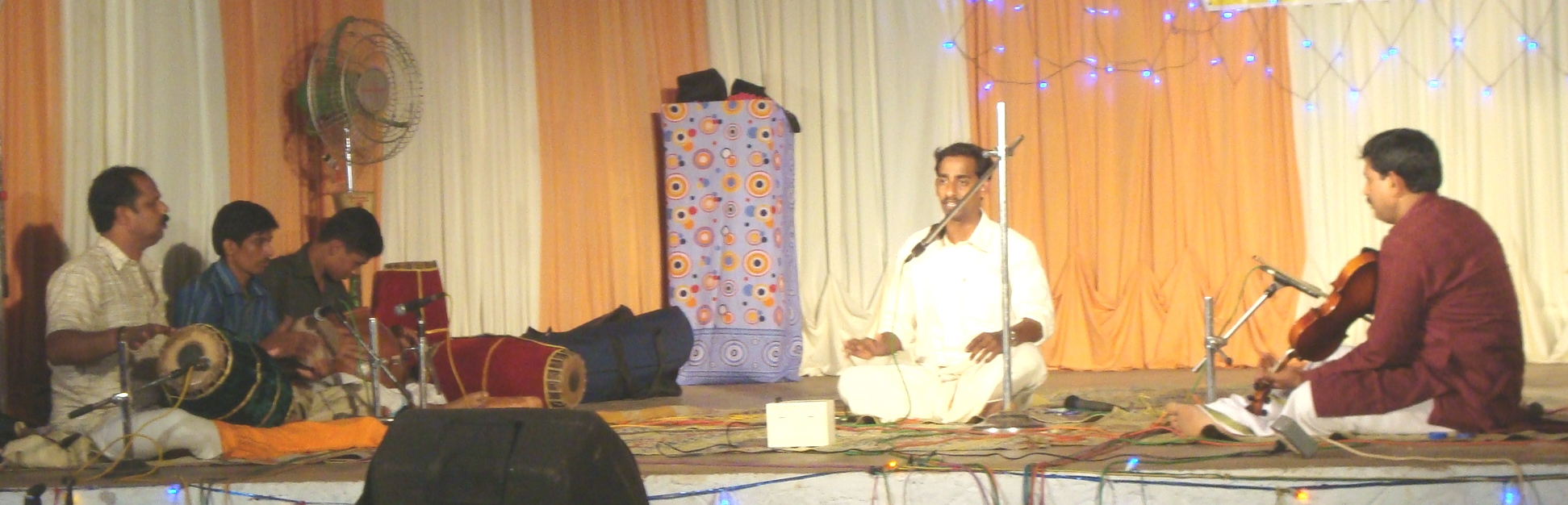 ഒരു കർണ്ണാടകസംഗീതകച്ചേരി. ചാലക്കുടി ഫാസ് ഓഡിറ്റോറിയത്തിൽ നടന്ന ഒരു പരിപാടി